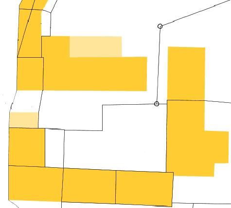 Cadastration actuelle de la cour des artisans.